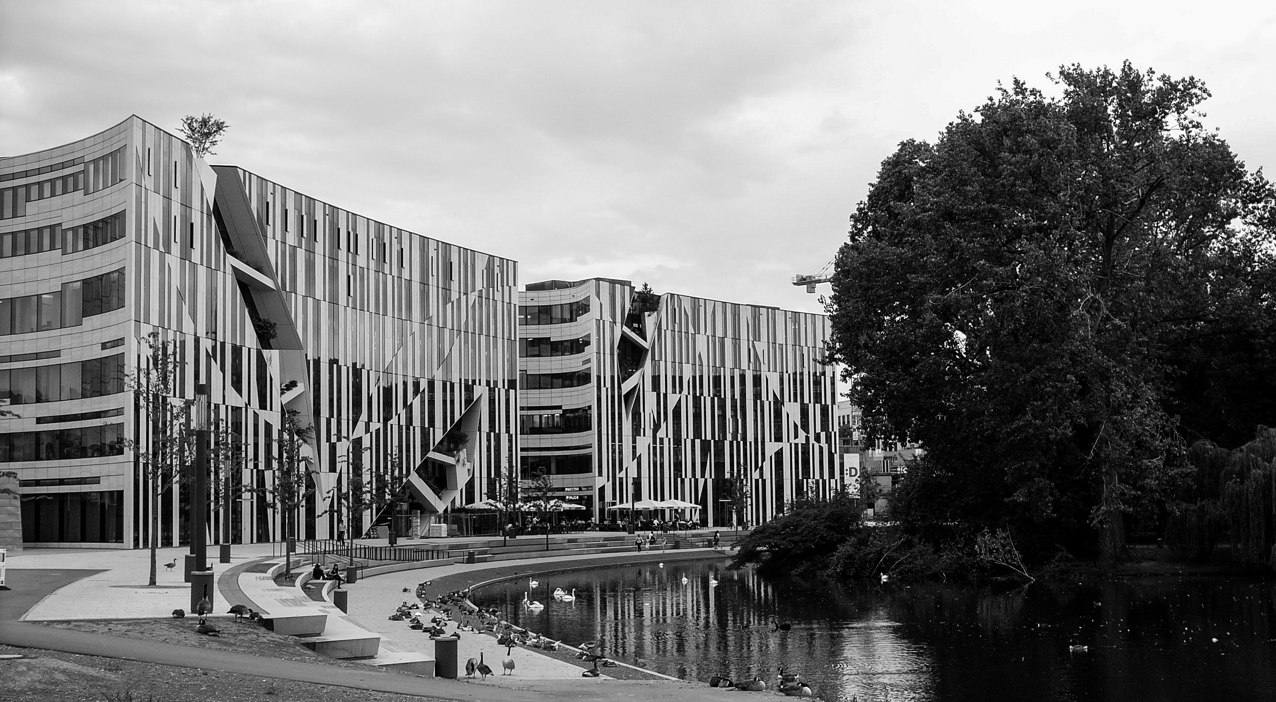 Kö-Bogen in Düsseldorf, schwarz-weiß